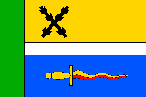 vlajka, Vracovice, okres Znojmo